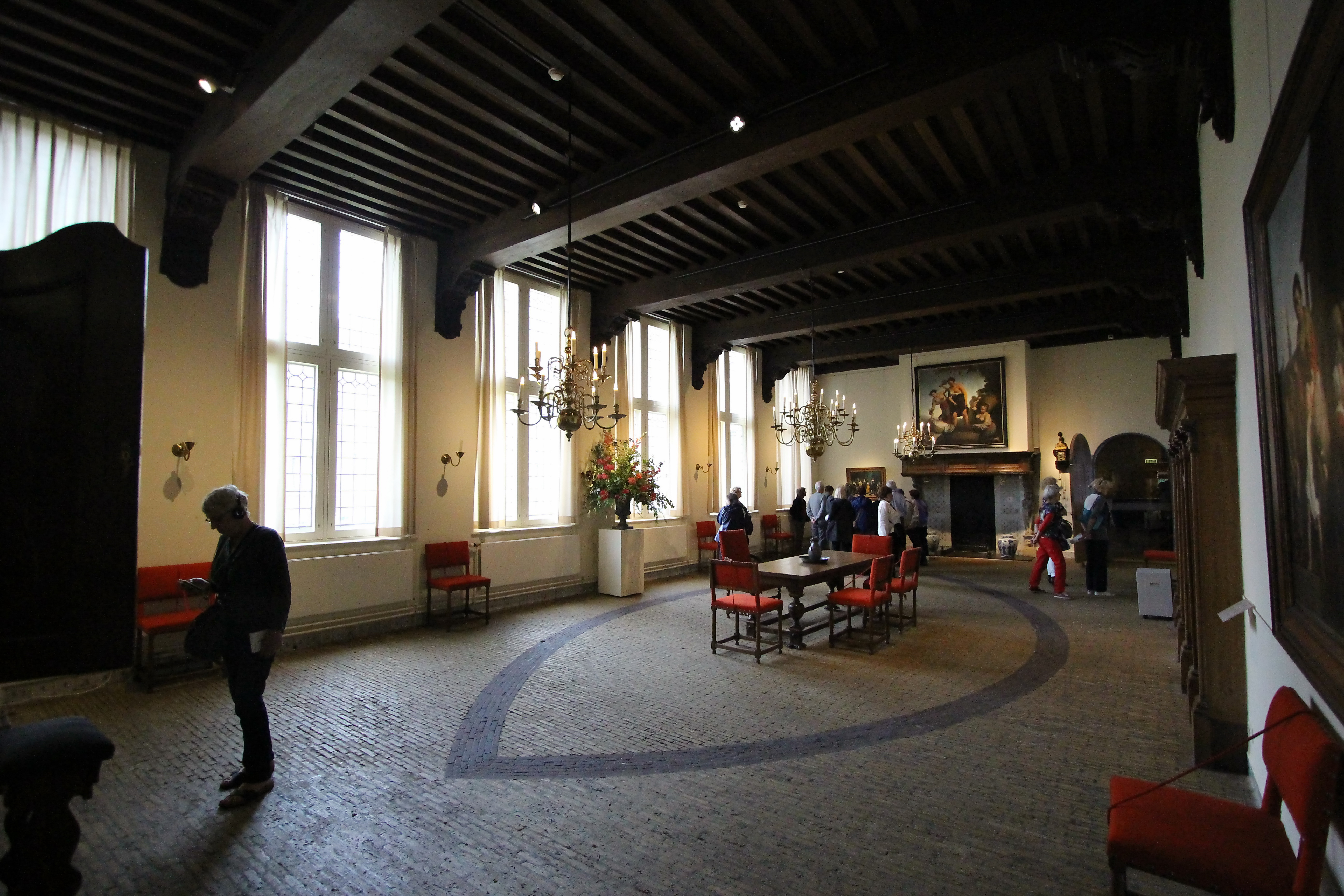 frans hals museum, haarlem (61)